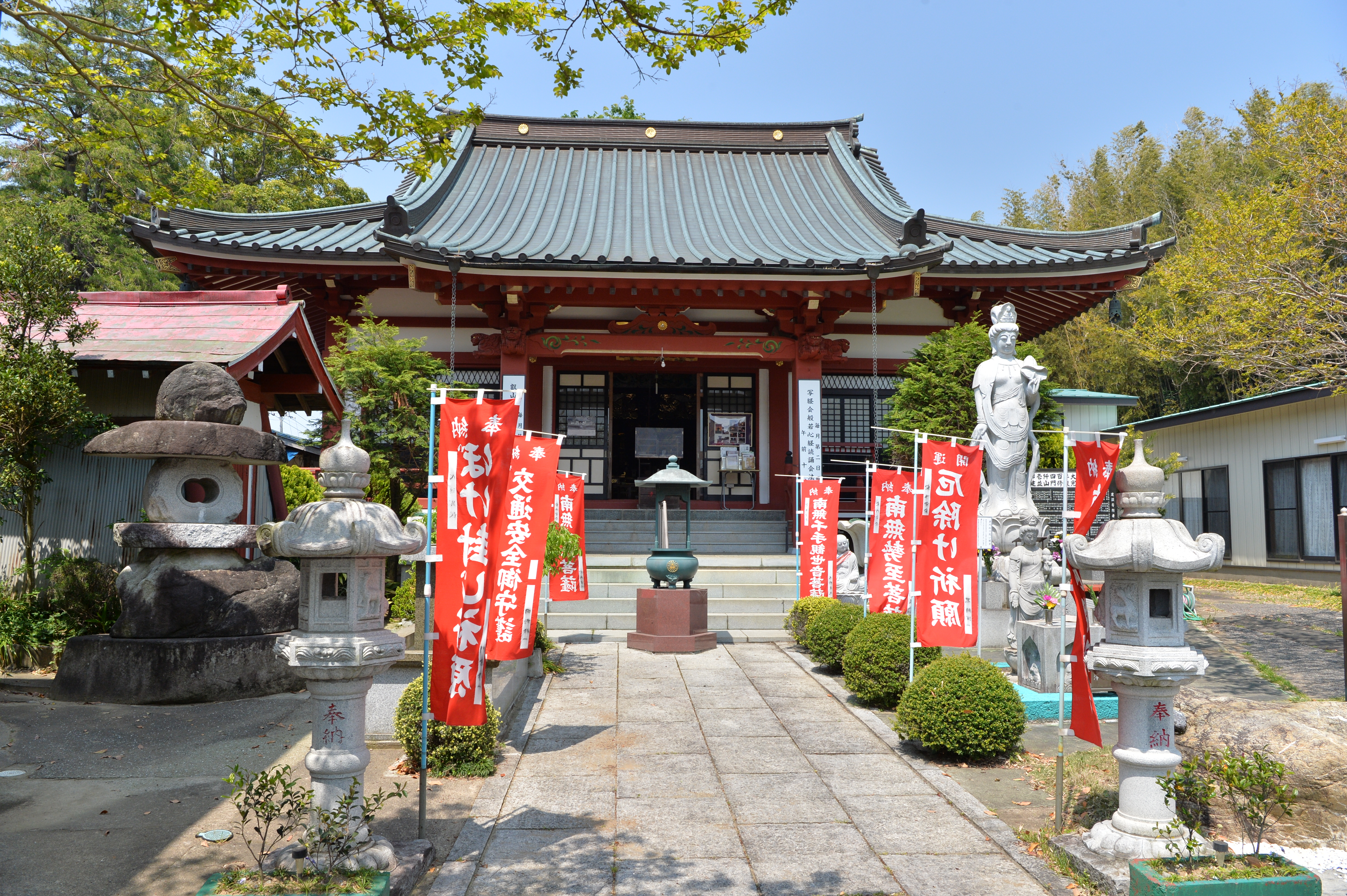 来迎院（龍ケ崎市）の本堂。鉄筋コンクリート造で、法事などのお参りは、この建物で行われる。